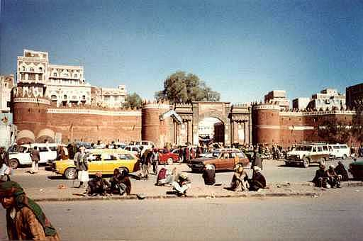 Bab-el-Yemen, Sana'a Photo by Wilhelm von Schreeb, Sweden, in 1980